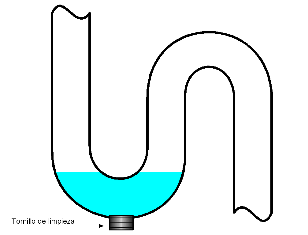 Sifón de un desagüe.